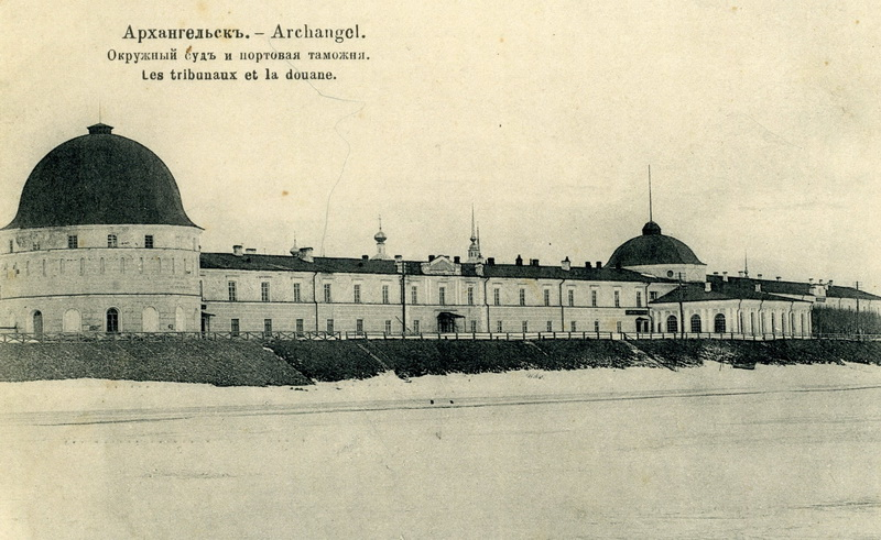 Фотография Гостиного двора в Архангельске, начало XX века